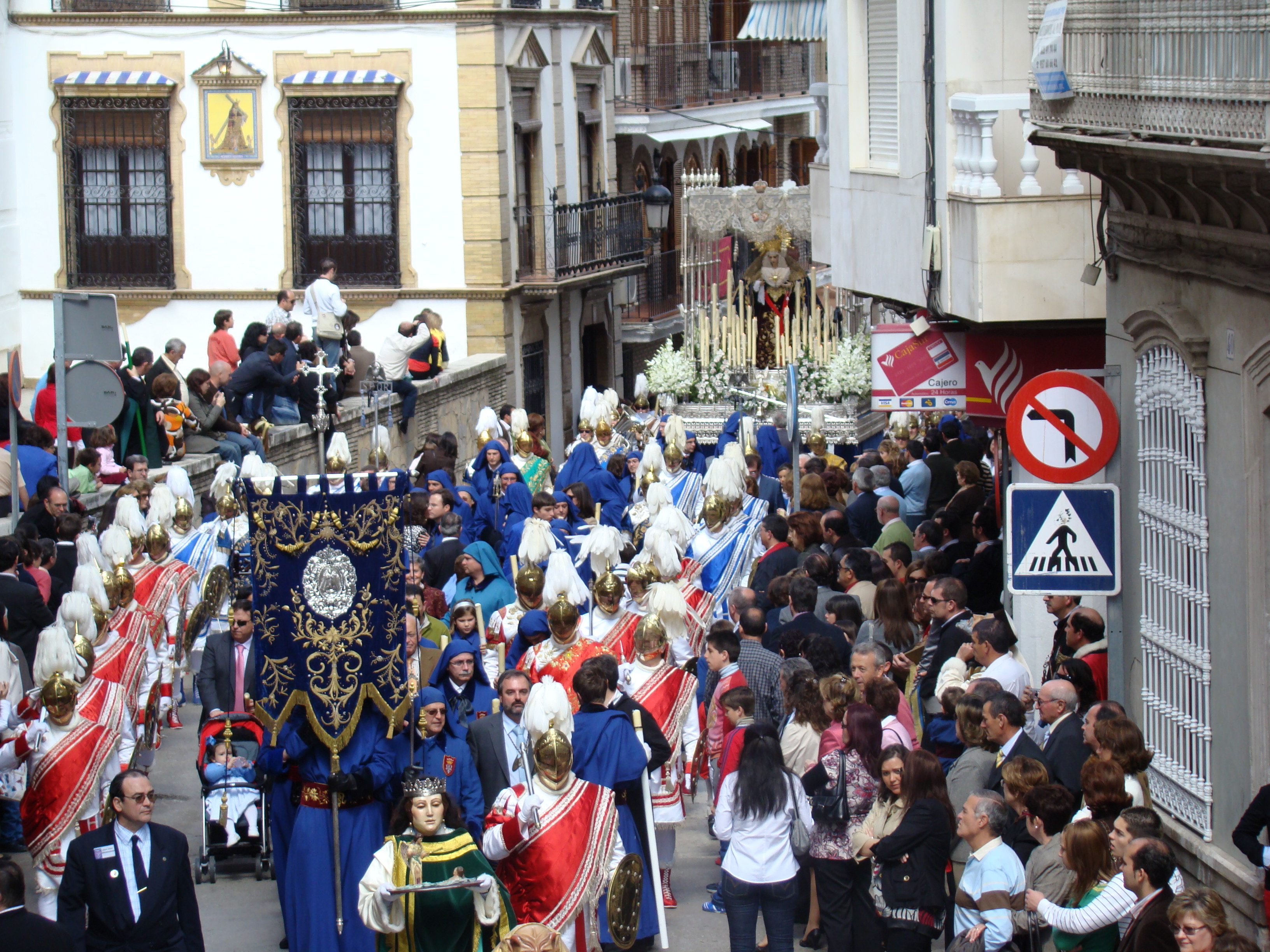 El Imperio Romano de Puente Genil, en Córdoba (España)